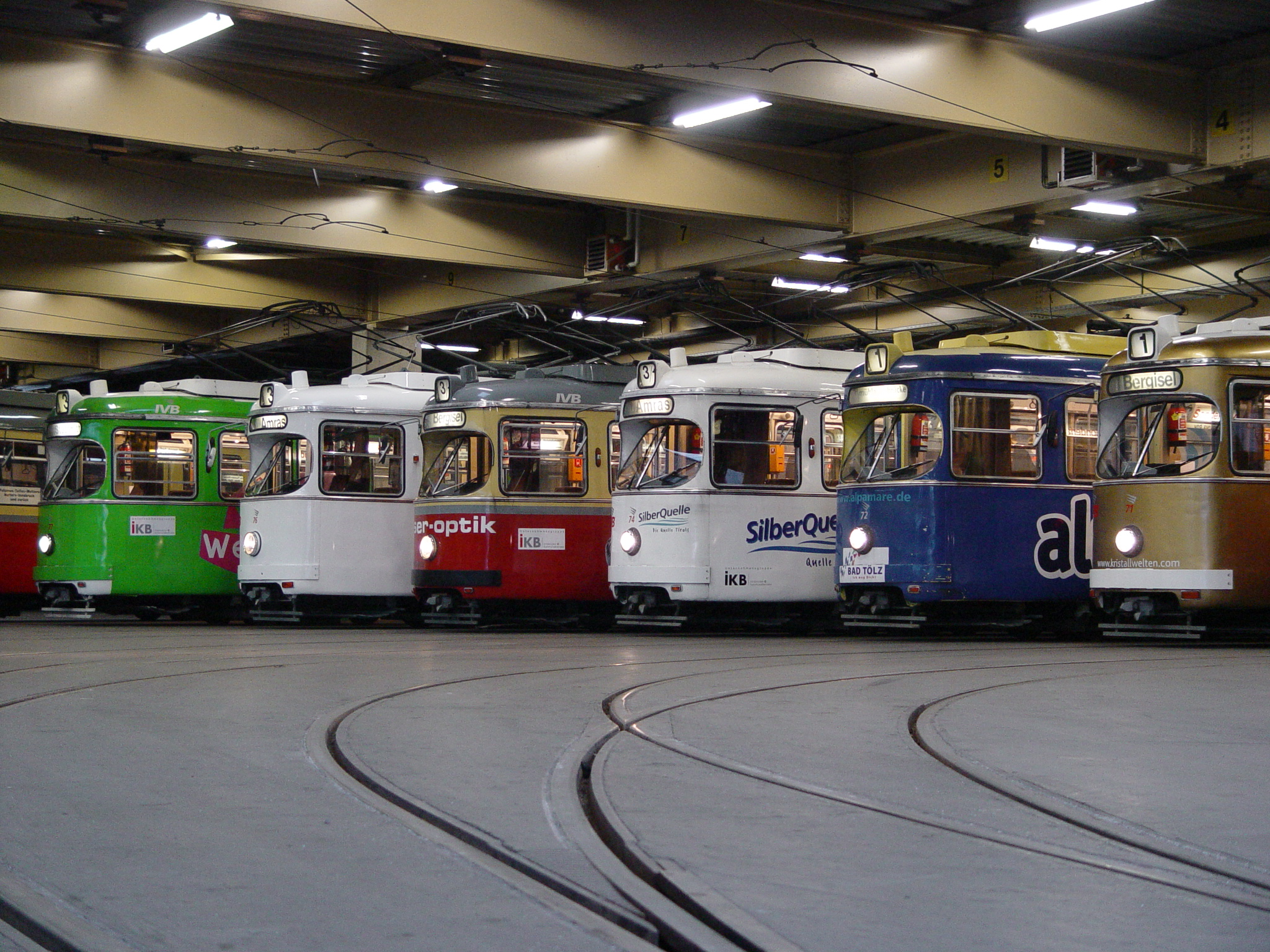 Parade der Lohnertriebwagen in der IVB-Remise anlässlich ihres 40tesn Geburtstages